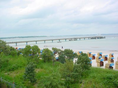 Seebrücke von Scharbeutz (Ostsee)